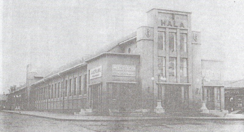 Здание "Халы"